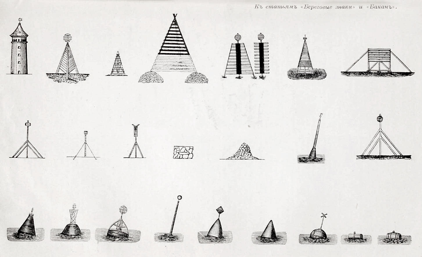 Данное изображение было использовано в статье «Бакан» опубликованной в четвёртом томе «Военной энциклопедии», который был издан книгоиздательским товариществом Ивана Дмитриевича Сытина в 1911 году в столице Российской империи городе Санкт-Петербурге.